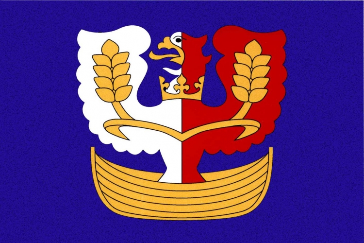 vlajka, Mšecké Žehrovice, okres Rakovník